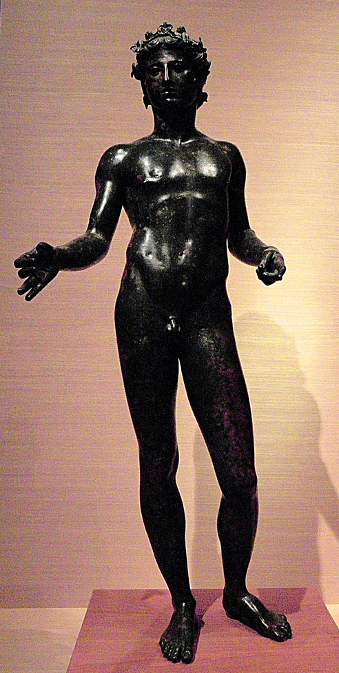 Efebo de Antequera. Escultura romana de bronce del s. I d. e. Representa a un joven a tamaño natural (1,54 cm.), en su pubertad, iniciando un pasito hacia adelante. Puede tratarse de una copia o adaptación de época romana de un modelo original griego del período clásico (s. V. a. e.), de autor desconocido, mas no sería extraño que fuera de Fidias o Praxíteles. El efebo está desnudo y coronado de corimbos y yedra, concebido como un stephanéphoros o quizá mejor lampadophoros, para un ambiente de un triclinium o áulico a efectos fundamentalmente decorativos. El punto exacto del hallazgo de la pieza se desconoce. Sólo se sabe que fue encontrado de forma casual en el cortijo conocido como Las Piletas, propiedad del Sr. Jiménez Blázquez, hacia 1950. Su viudad donó la escultura al Ayuntamiento de Antequera, a cuyo museo retornará en noviembre de 2010. Actualmente y hasta el 30 de octubre se puede contemplar en el Palacio Episcopal de Málaga. Según García Bellido esta es la "pieza antigua más hermosa salida de suelo peninsular".